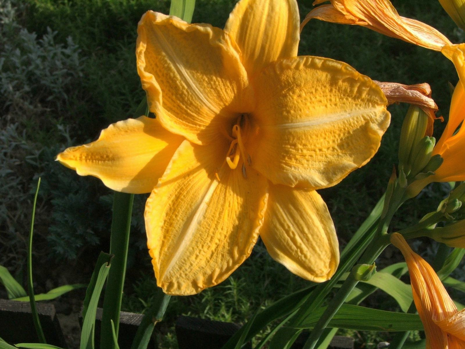 Hemerocallis x hybrida (pl. liliowiec ogrodowy)